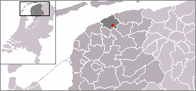 Kaart met de locatie van Wânswert (Wanswerd), gemaakt uit sjabloon van Wikipedia-gebruiker Mtcv